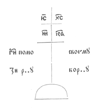 Прорисовка надписи на Борисовом камне в Дисне (втором).